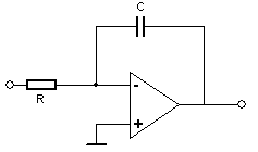 Integriererschaltung mit einem OP